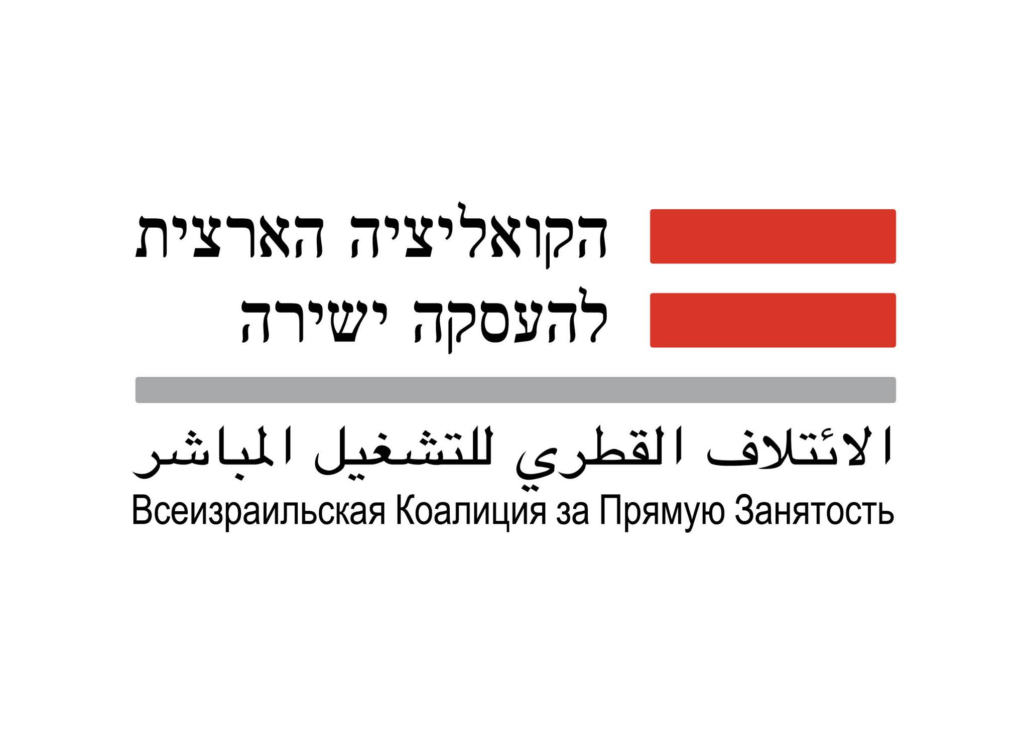 הלוגו הרשמי של הקואליציה הארצית להעסקה ישירה.